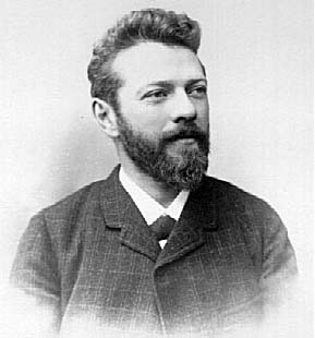 Julius Mac Leod - (Oostende 1857 - 1919 Gent) - Gent - Oost-Vlaanderen - Vlaanderen - België